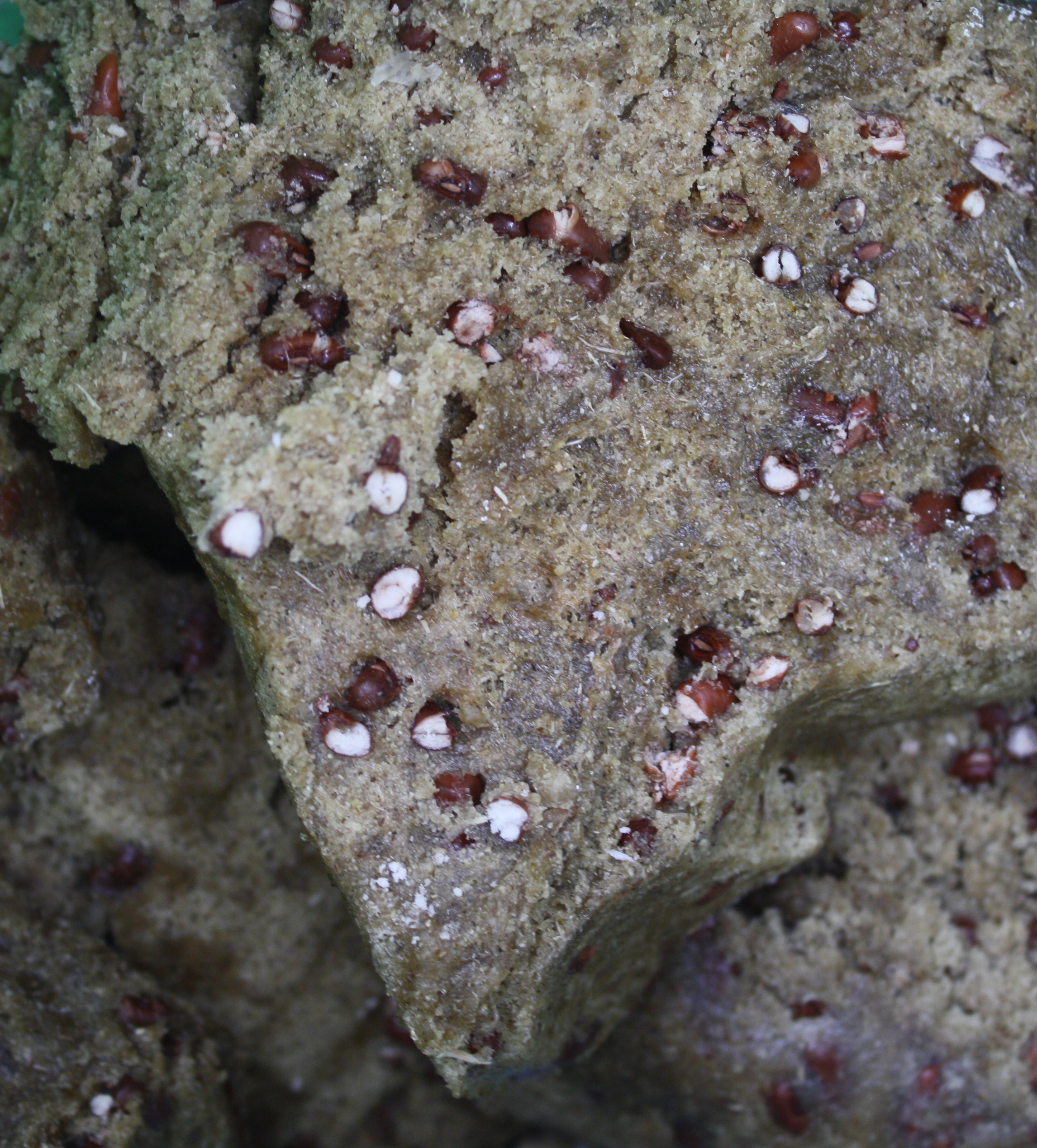 Saplak yaitu salah satu makanan khas jawa yang terbuat dari gaplek dan ada kacangnya